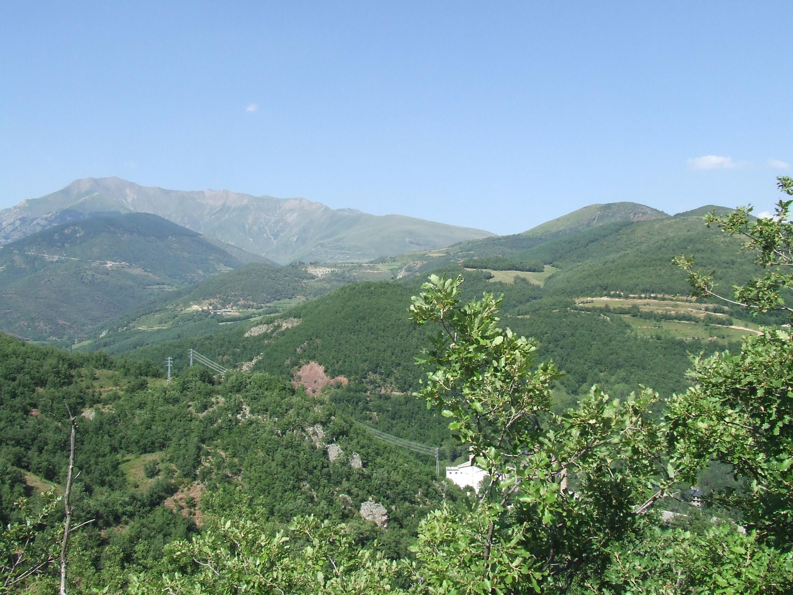 La part del terme de Benés que limita amb la Torre de Cabdella (Sarroca de Bellera (Pallars Jussà)